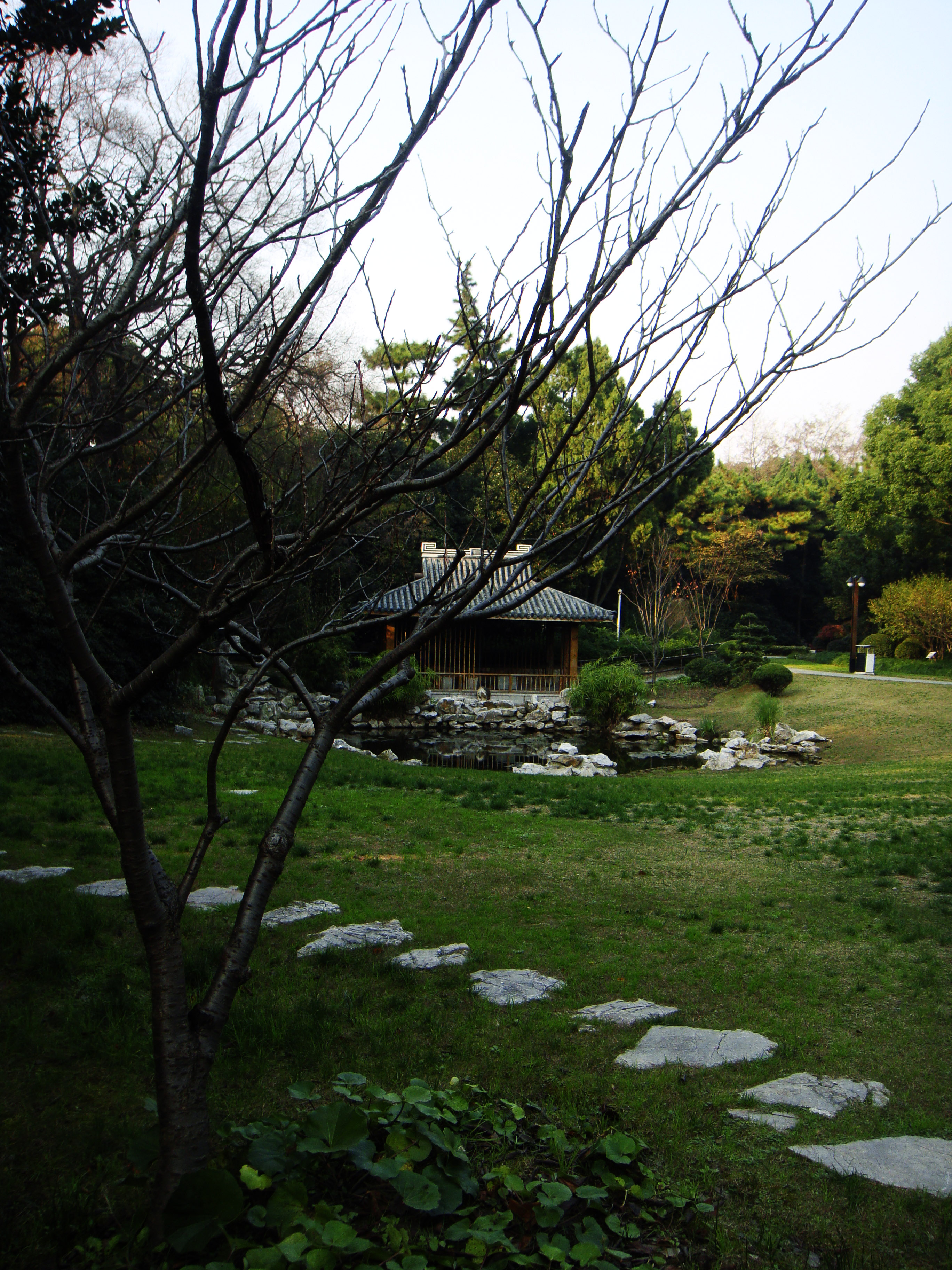 复兴岛公园内的日式庭院